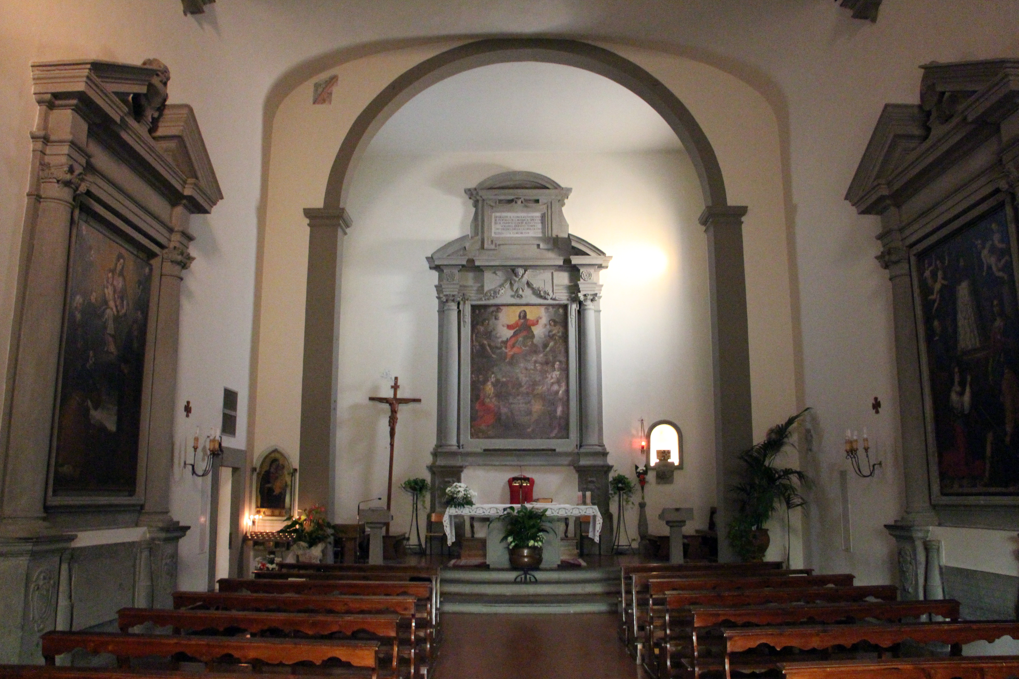 Santa Maria Assunta (Spicchio)